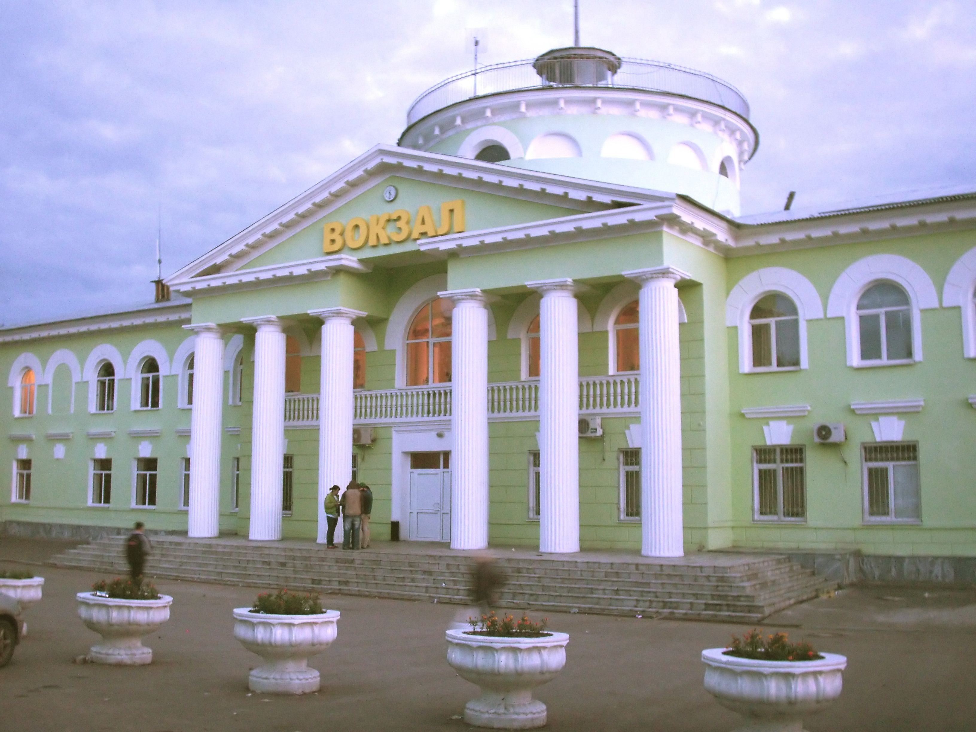 Новокуйбышевск вокзал